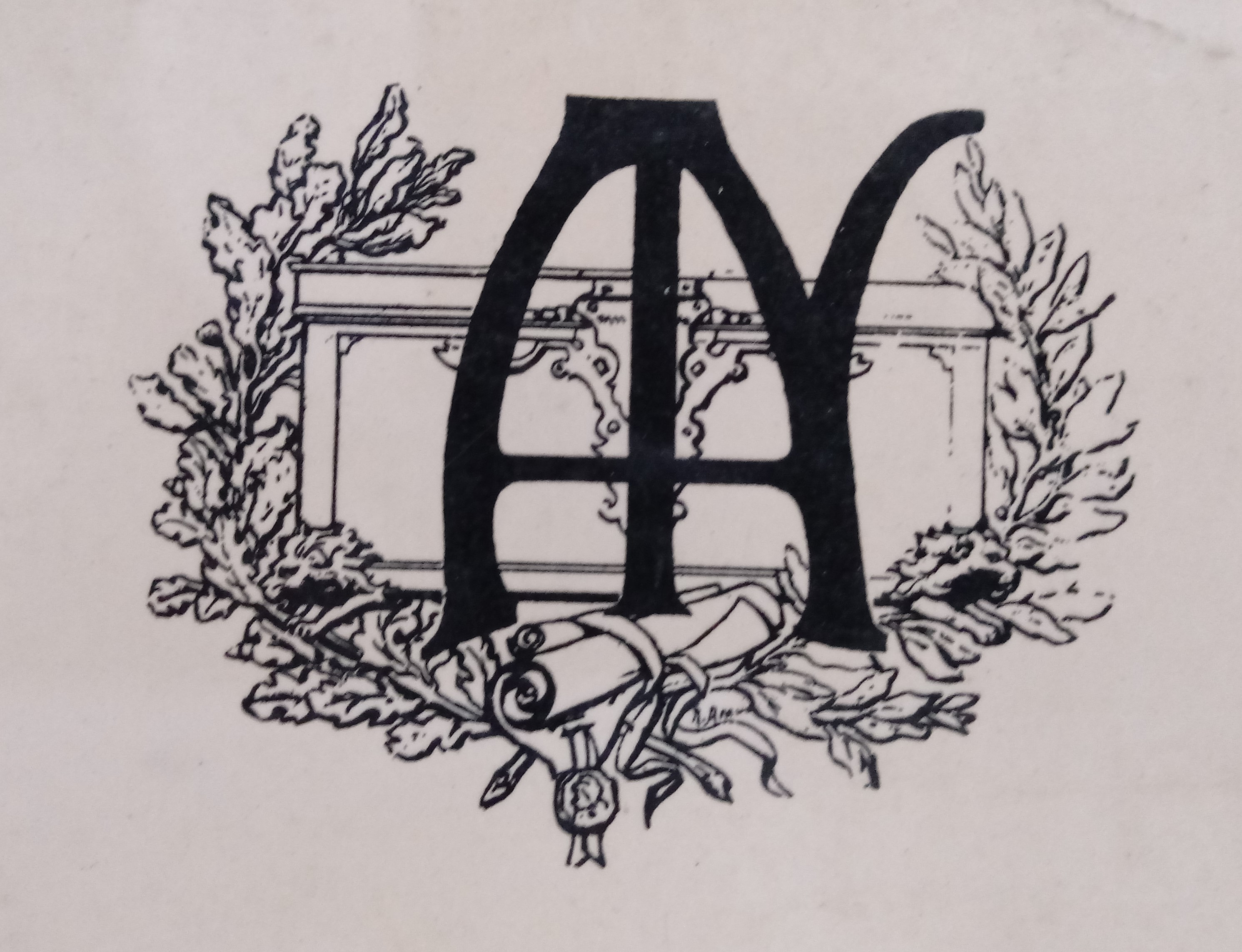 Ex Libris Arquivo Nacional do Brasil que tem na capa de uma publicação do órgão em 1972